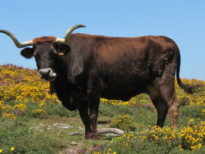 A vaca maronesa é caraterística do Alvão. This is a photography of a Site of Community Importance in Portugal with the ID: PTCON0003. Natura2000 entry, EEA entry